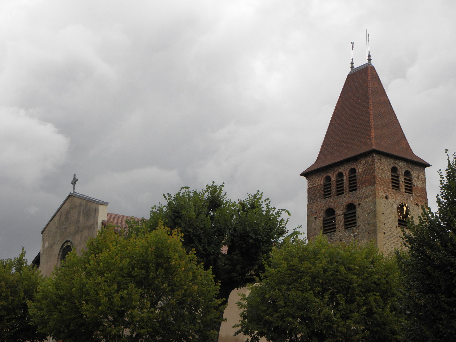 Façade occidentale et tour-clocher de l'église Saint-André de La Côte-Saint-André (38). .